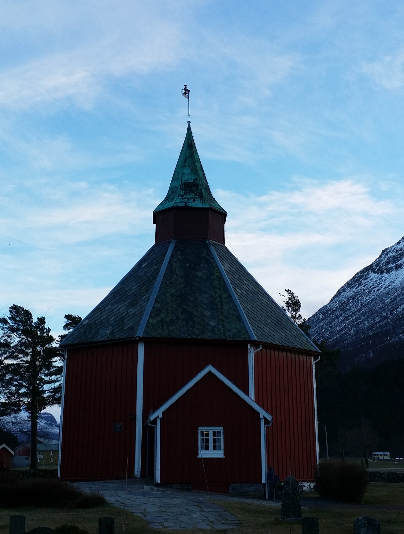 Ålvundeid kirke er en åttekantet kirke fra 1848 i Sunndal kommune, Møre og Romsdal fylke. Klippet til annet format.